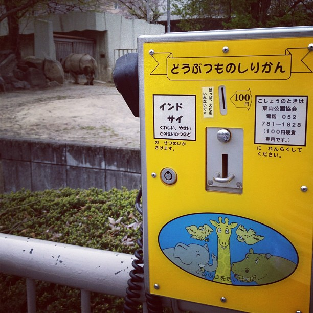 どうぶつものしりかん インドサイ